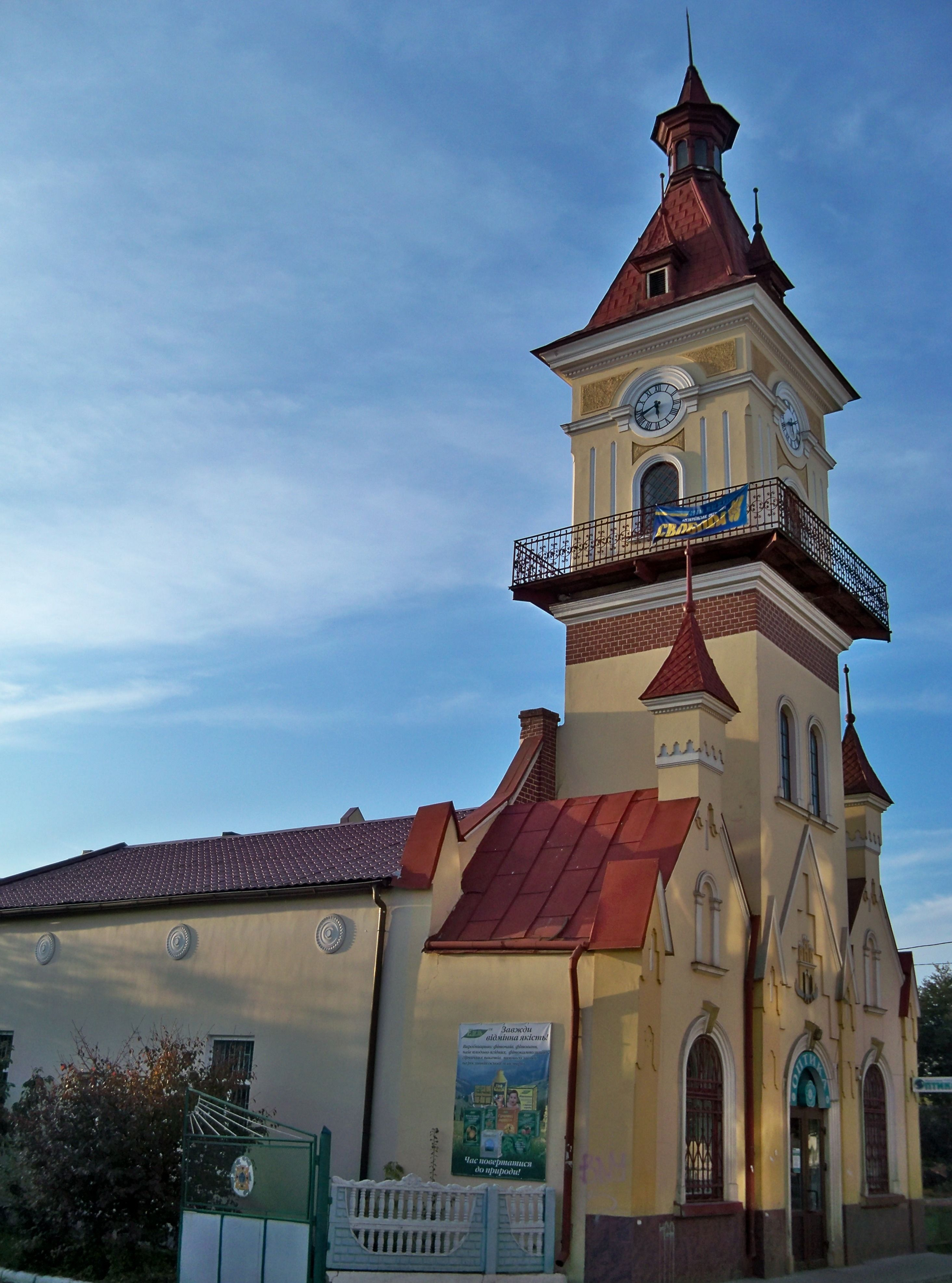 Будинок магістрату, Рава-Руська, вул. Грушевського, 22